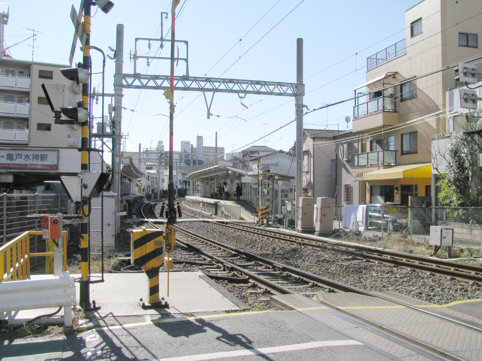 東武亀戸線亀戸水神駅